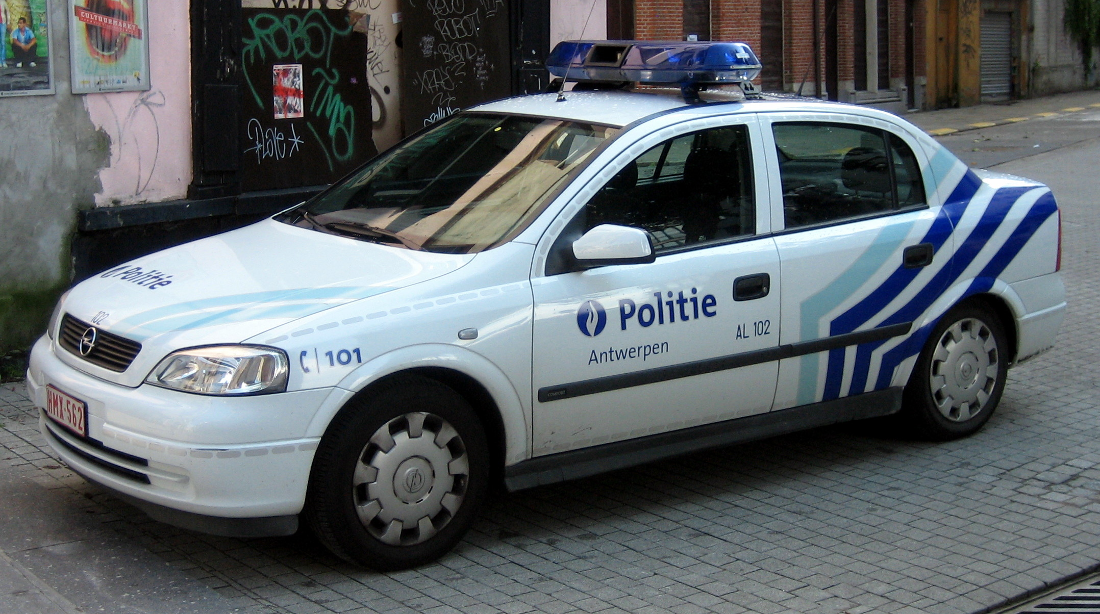 Local Police car in Antwerp, Belgium.